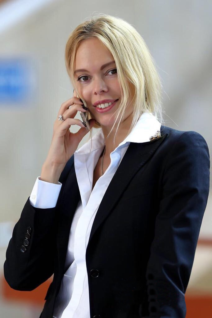 Российская гимнастка Мария Столбова